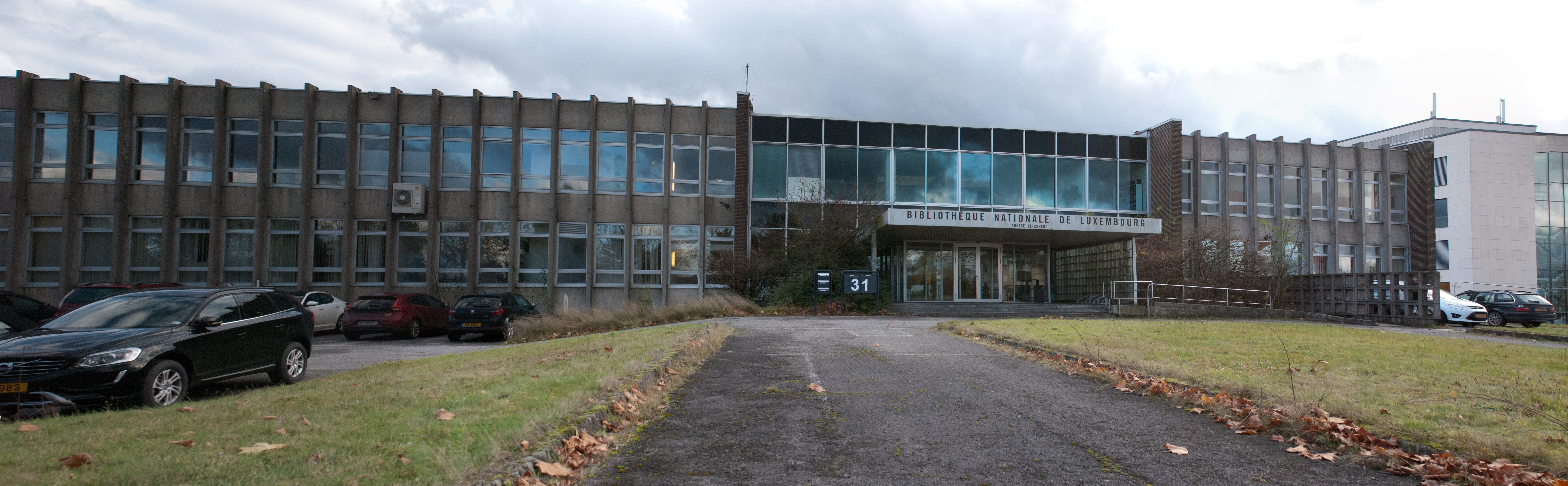 Nationalbibliothk Luxemburg, Verwaltungsgebäude auf dem Kirchberg